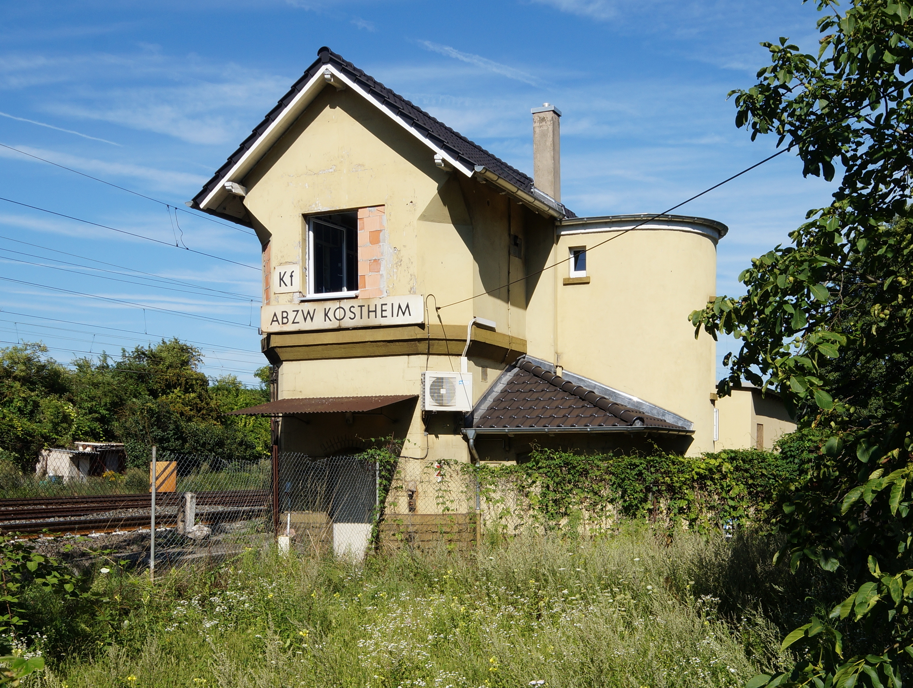 Das Stellwerksgebäude der Abzweigstelle Kostheim an der Taunus-Eisenbahn und der Umgehungsbahn Mainz in Mainz-Kostheim in Wiesbaden